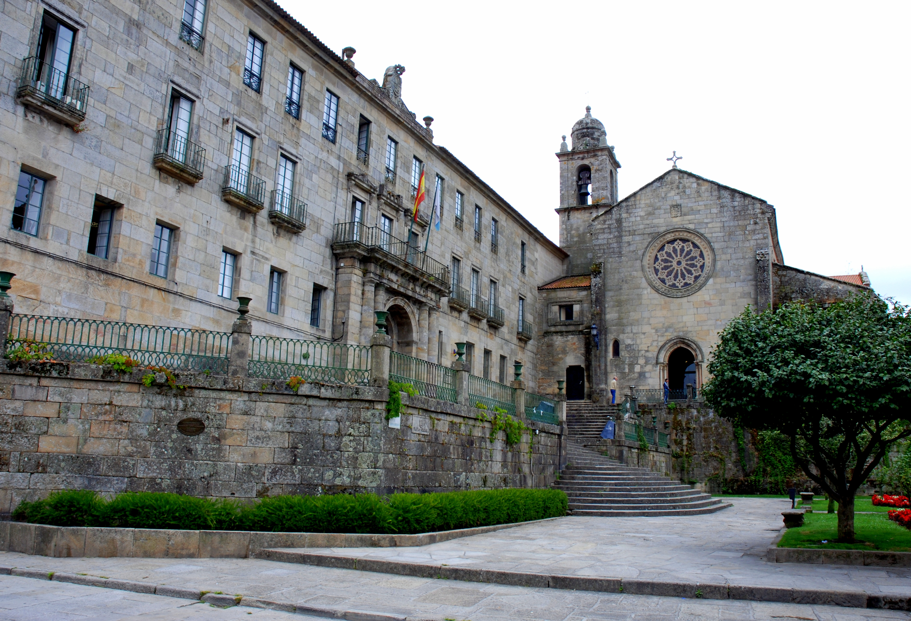 Iglesia de San Francisco, Pontevedra